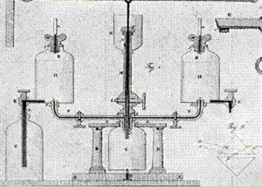 Jedlik Ányos: savanyúvízi készületének rajza